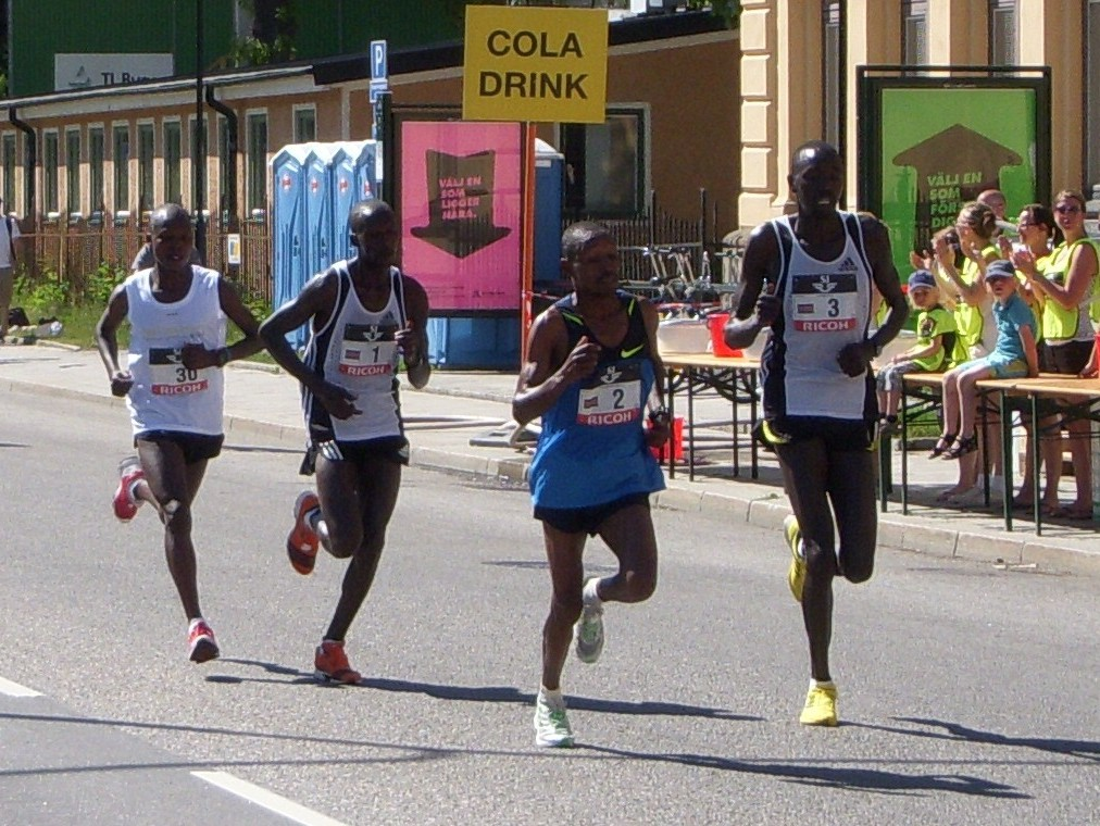 Paul Kipkemei Kogo (med nr 2) på Norr Mälarstrand, vinnare av Stockholm Marathon 2009